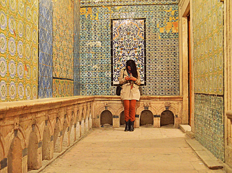 Médersa Bir Lahjar, Tunis